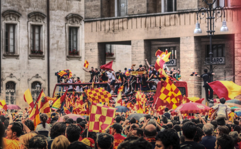 Festa in piazza Sant'Oronzo a Lecce per la promozione del Lecce in Serie A